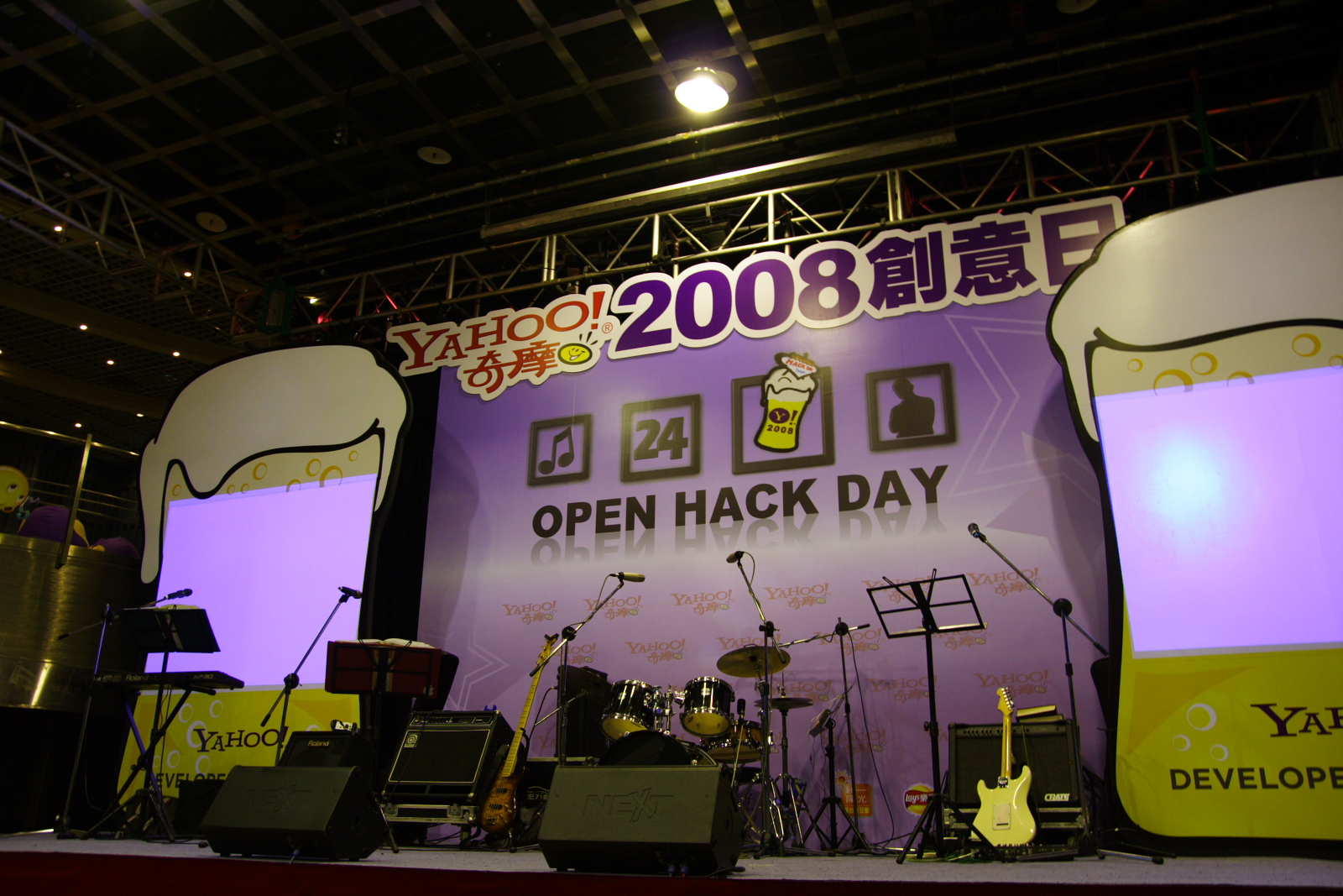 Yahoo!奇摩2008創意日主舞台。